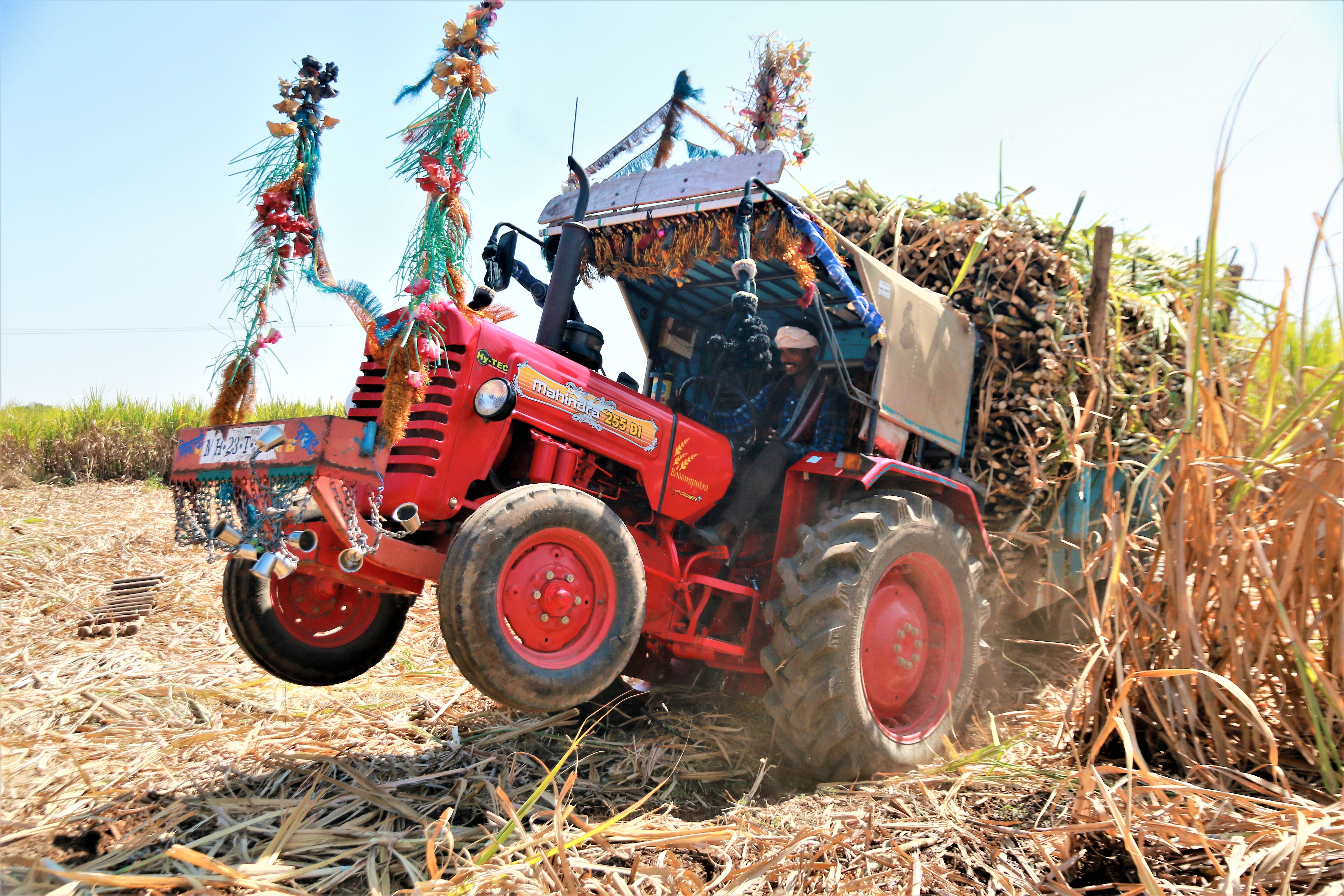 कोणत्याही प्रकारचा विमा संरक्षण नसताना मराठवाड्यातून ४०० कि मी दूरवरून येवून १० लाख उसतोड कामगार पश्चिम महारष्ट्रात अश्या प्रकारे असुरक्षित वातावरणात उस तोडतात .